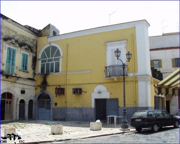 Facciata di Palazzo Merlicco a Cerignola (FG)